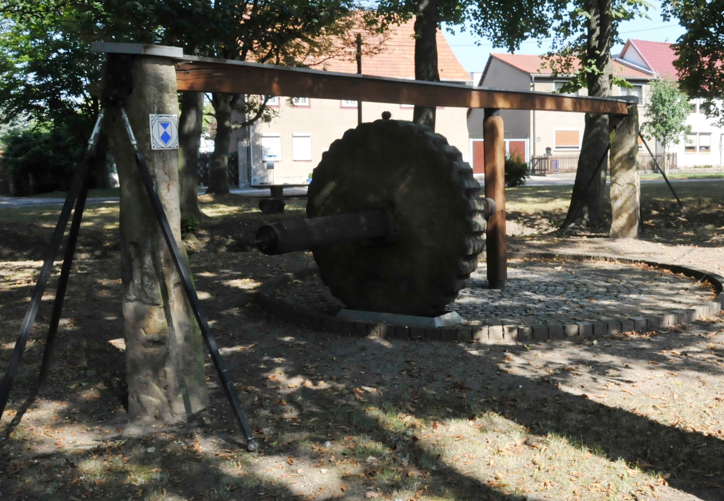 Rohrborn, Waidmühlstein